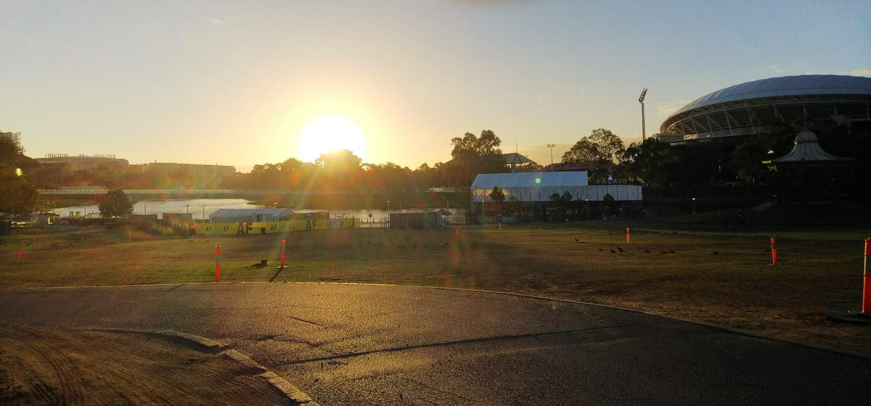 エルダー公園、奥にはトレンズ川が見える